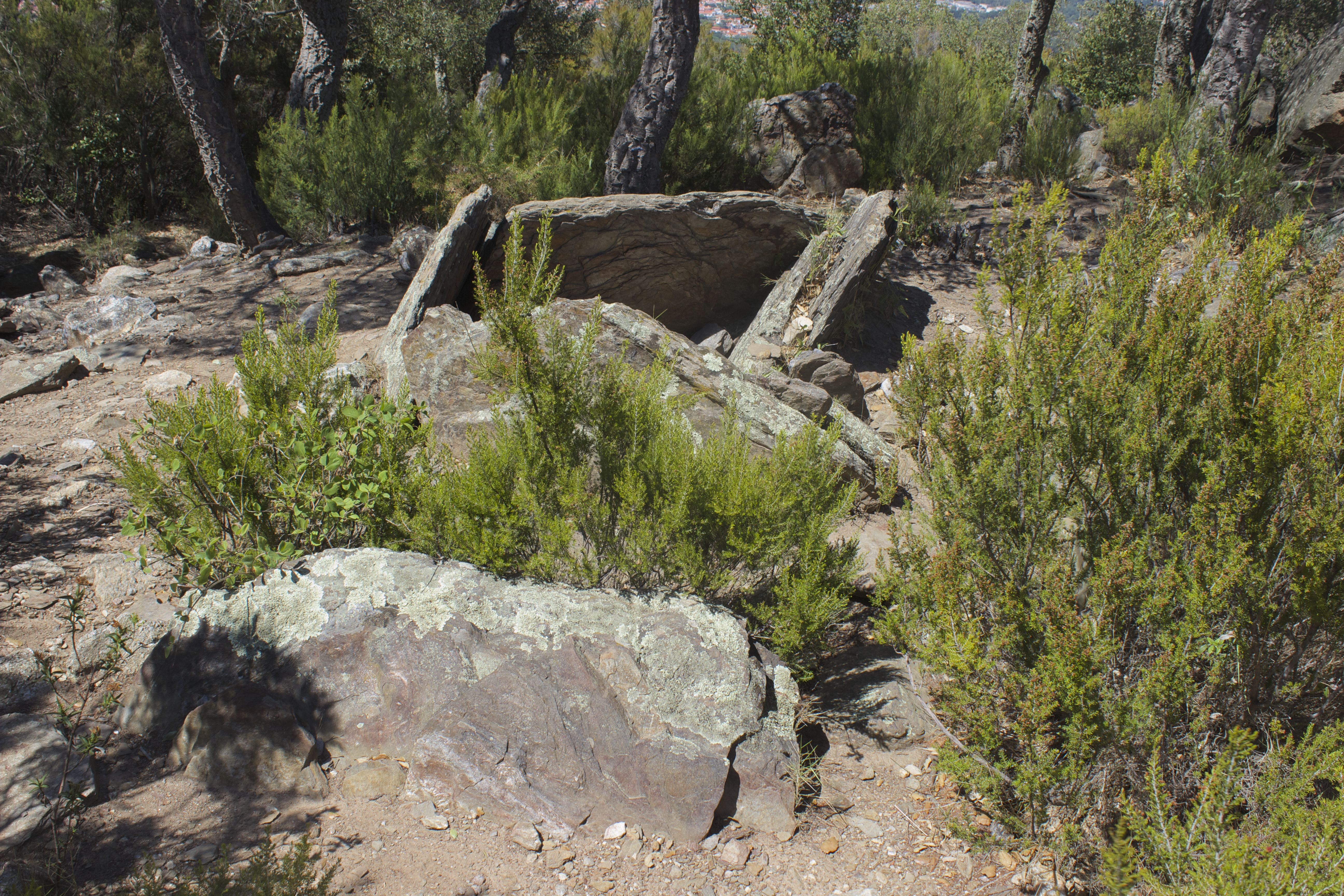 Dolmen des collets de Cotlliure